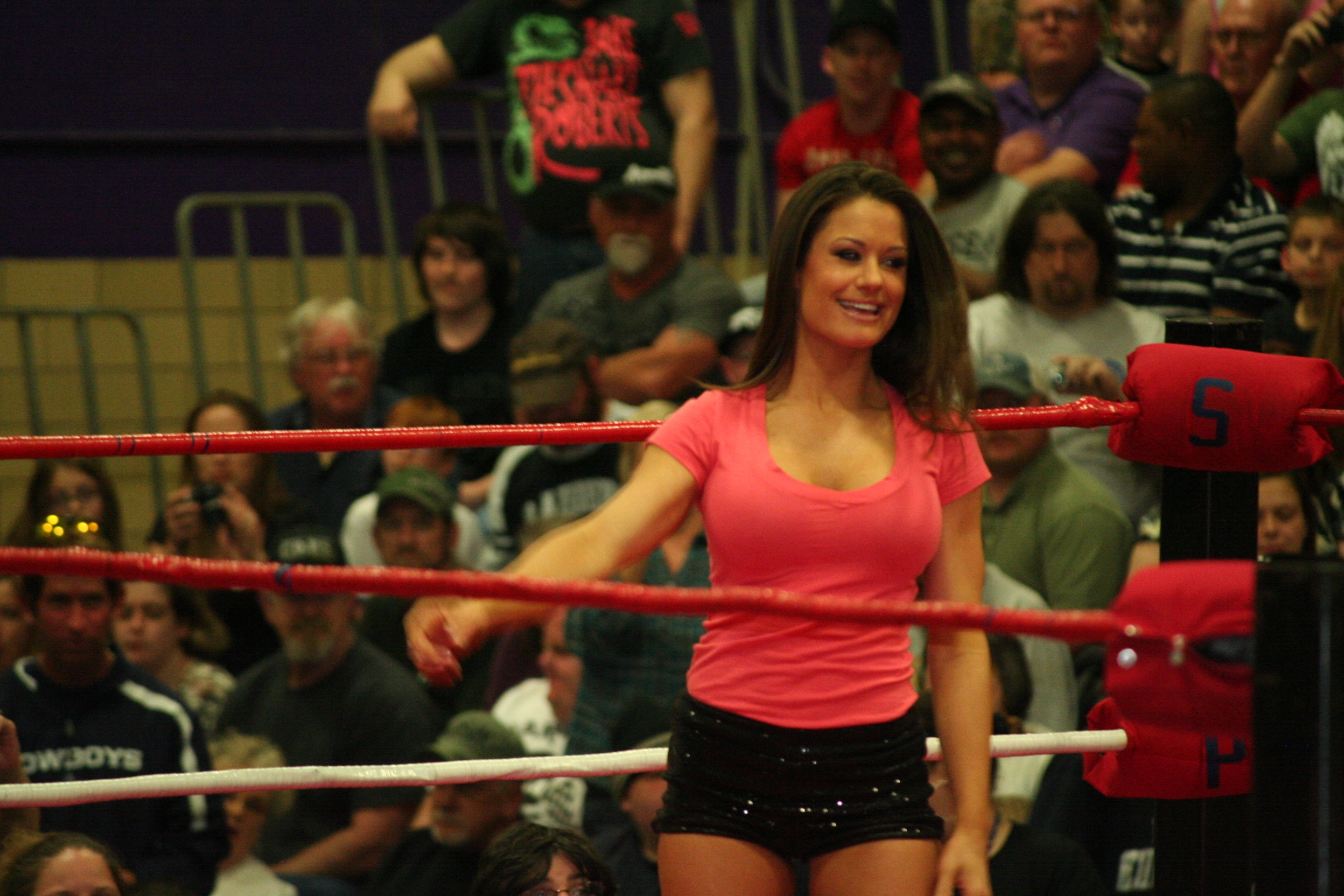 La catcheuse Brooke Tessmacher en 2013.